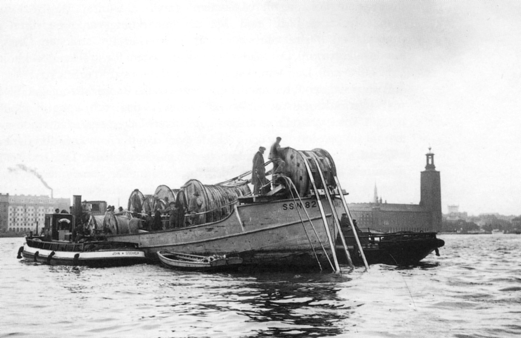 Läggning av undervattenskabel i Riddarfjärden